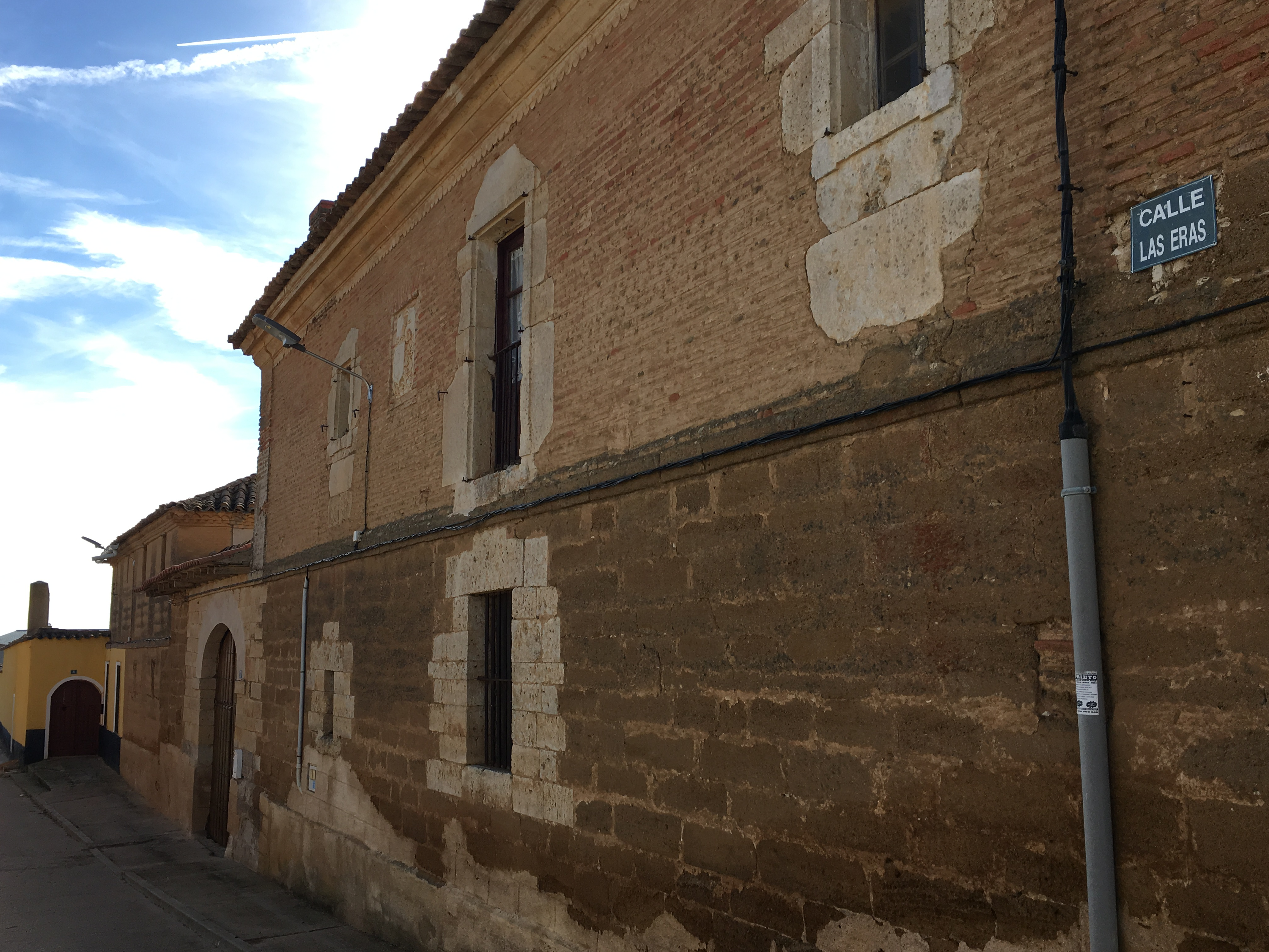 Villaesper Milenario